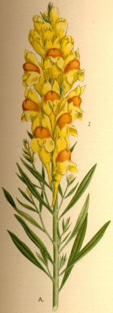 Gulsporre (Linaria vulgaris)